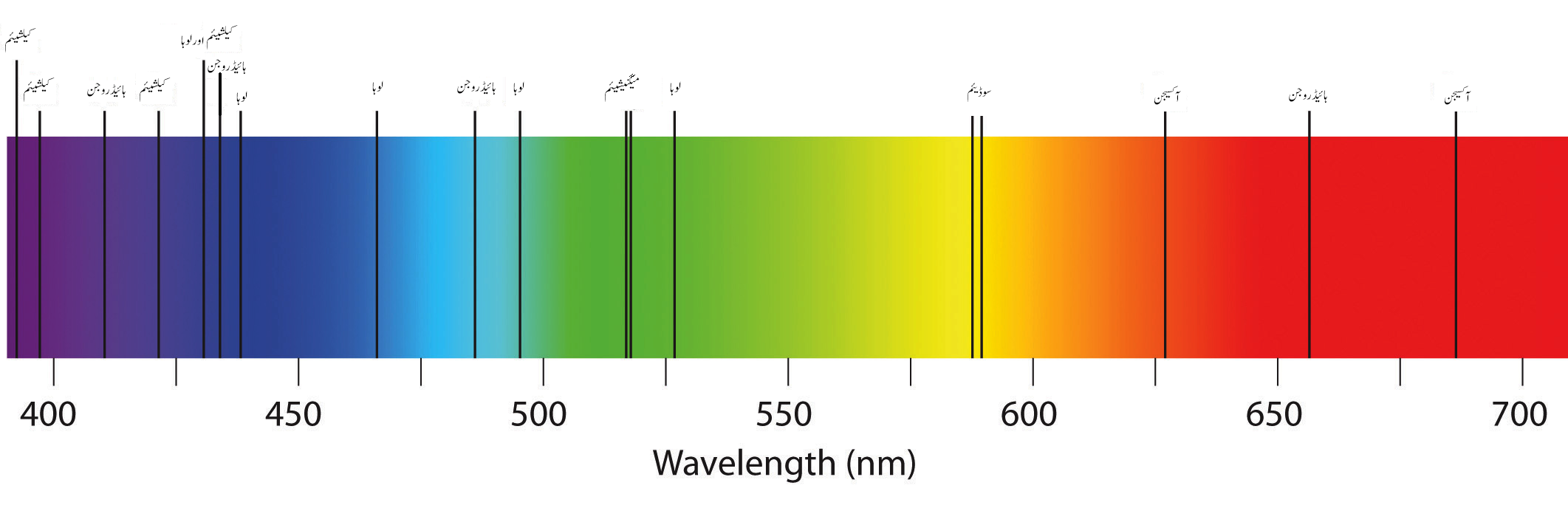 چند عناصر کی اسپیکٹرل لکیریں